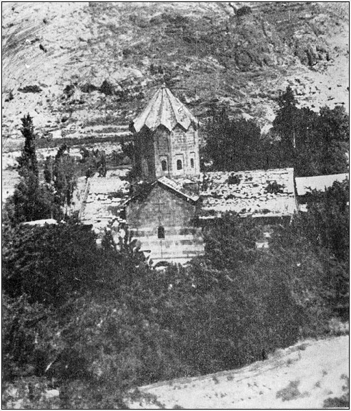 Ագուլիսի սբ.Թովմա վանք St. Thomas Church, Agulis